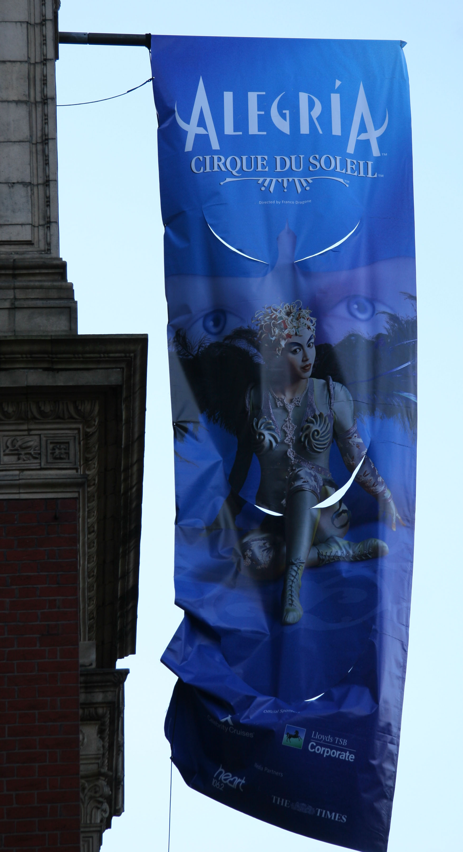 Cirque du Soleil, Alegria, at Royal Albert Hall, London, UK.